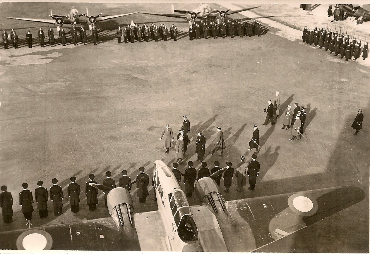 Prise d'armes à la BA144 Sétif - Ain-Arnat (Algérie) visite généraus Weygand et Noguès en inspection. Avions bombardiers Amiot 351.